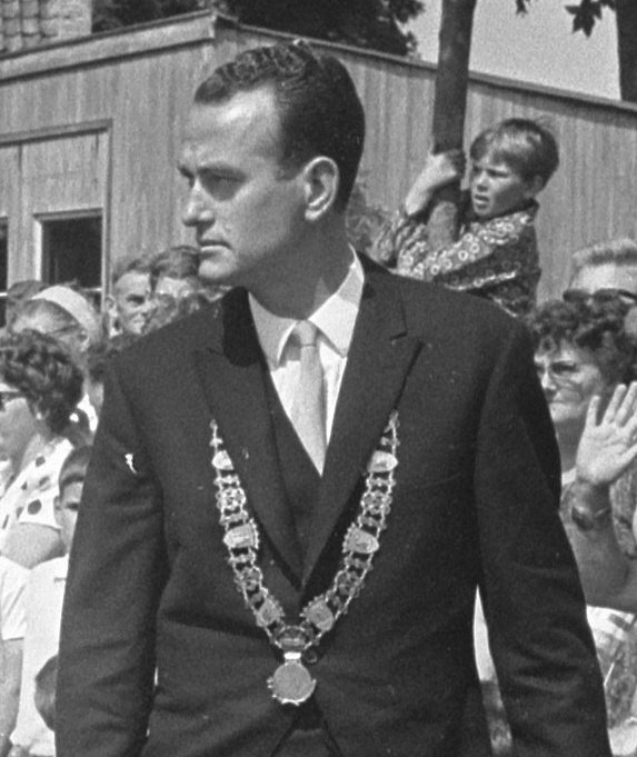 Wandeling door een dorp, links de commissaris van de koningin van Friesland, mr. H. Linthorst Homan, prins Bernhard, koningin Juliana en rechts burgemeester G. Rombout